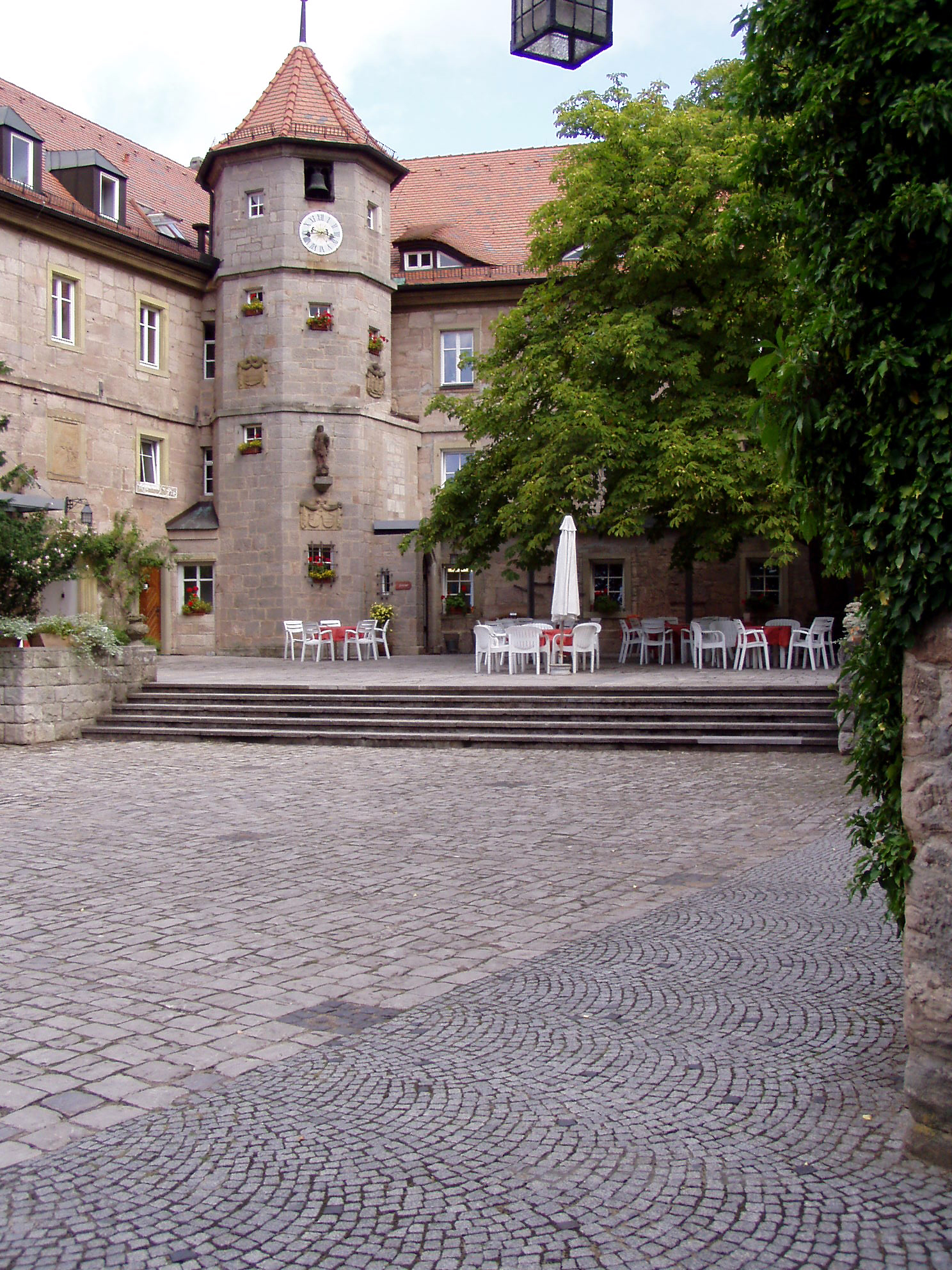 Im Schlosshof von Schloss Schwanberg, Rödelsee / Unterfranken